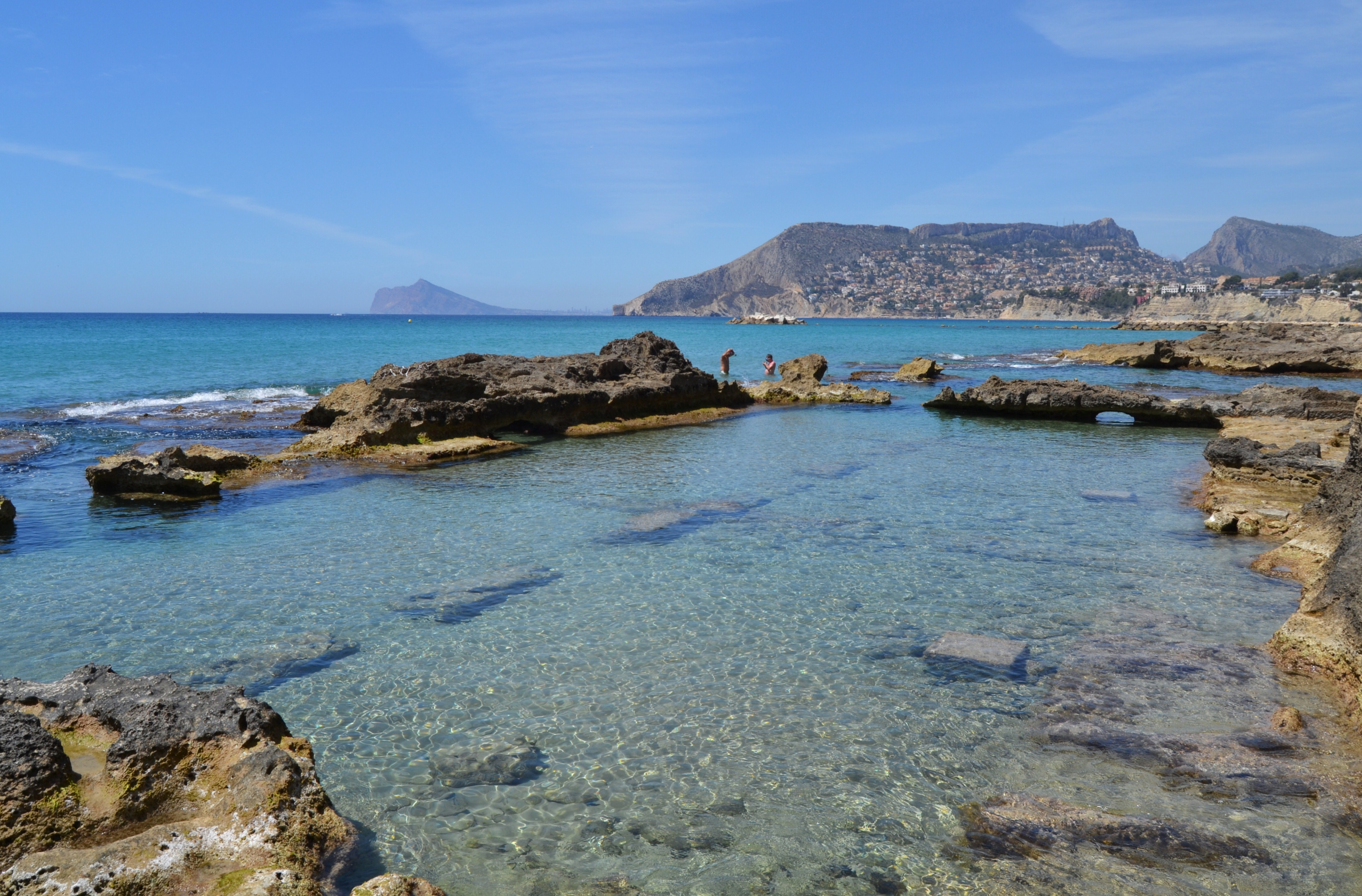 Piscifactoria romana, Banys de la reina de Calp.